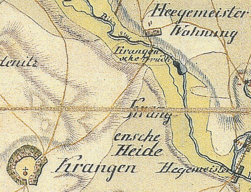 Krangensbrück, abgegangene Försterei, und Krangen, Ortsteil der Stadt Neuruppin, Lkr. Ostprignitz-Ruppin, Brandenburg, Ausschnitt aus dem Schmettauschen Kartenwerk von 1767/87, Sektion 50 Neuruppin